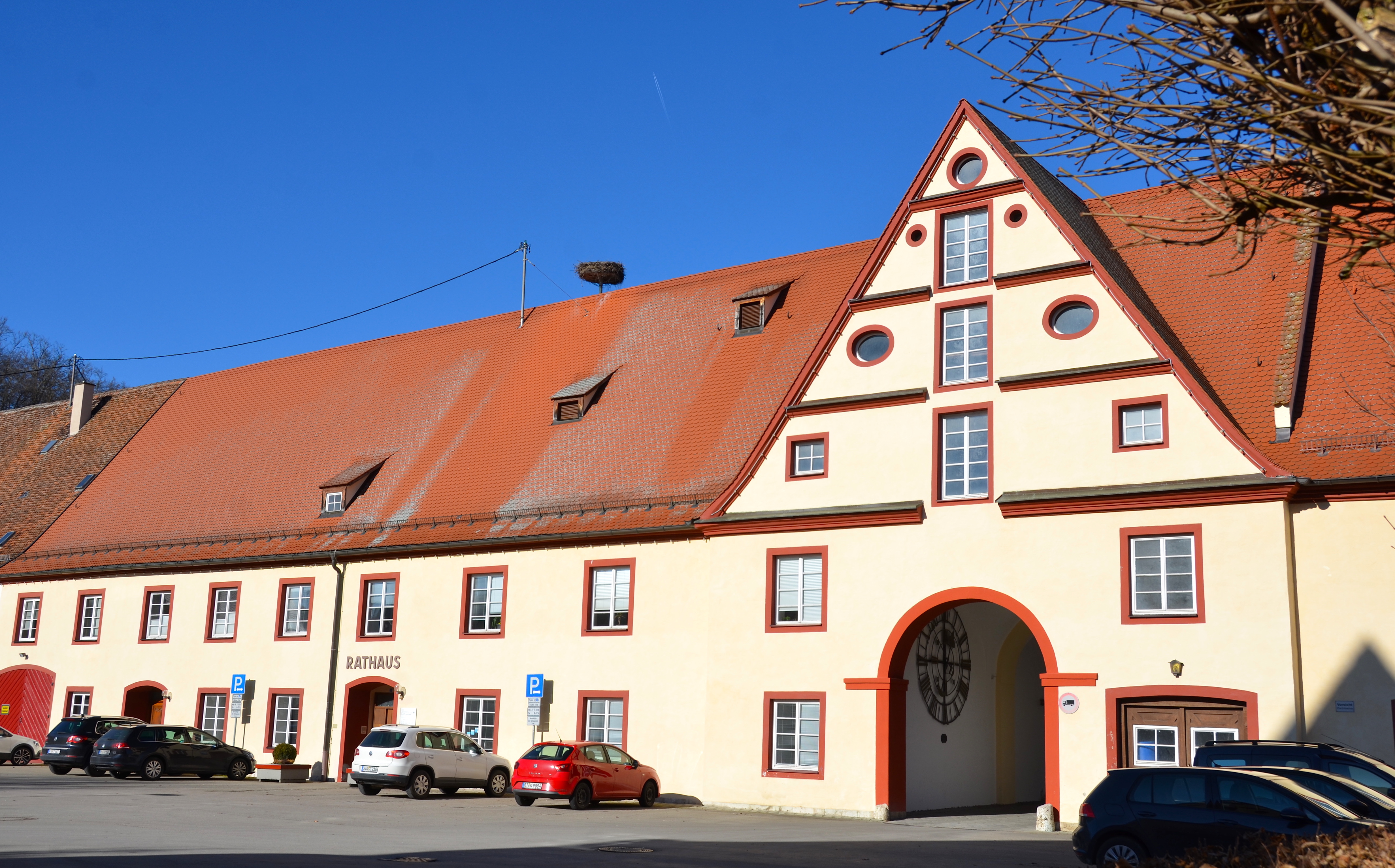 Rathaus in Zwiefalten, Baden-Württemberg